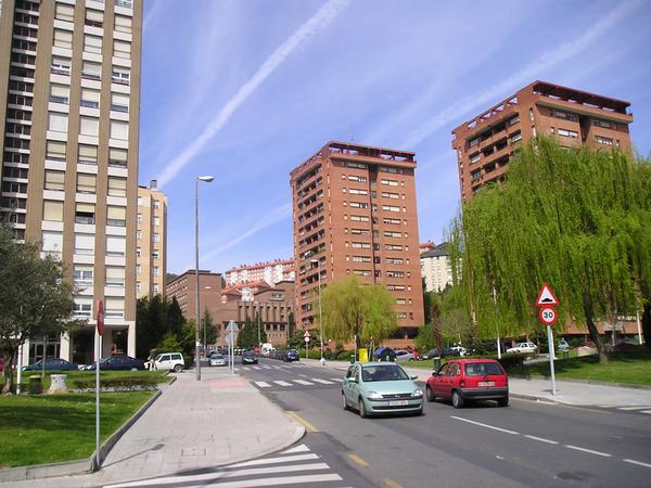 Gabriel Aresti etorbidea, Bilboko Txurdinaga auzoan.